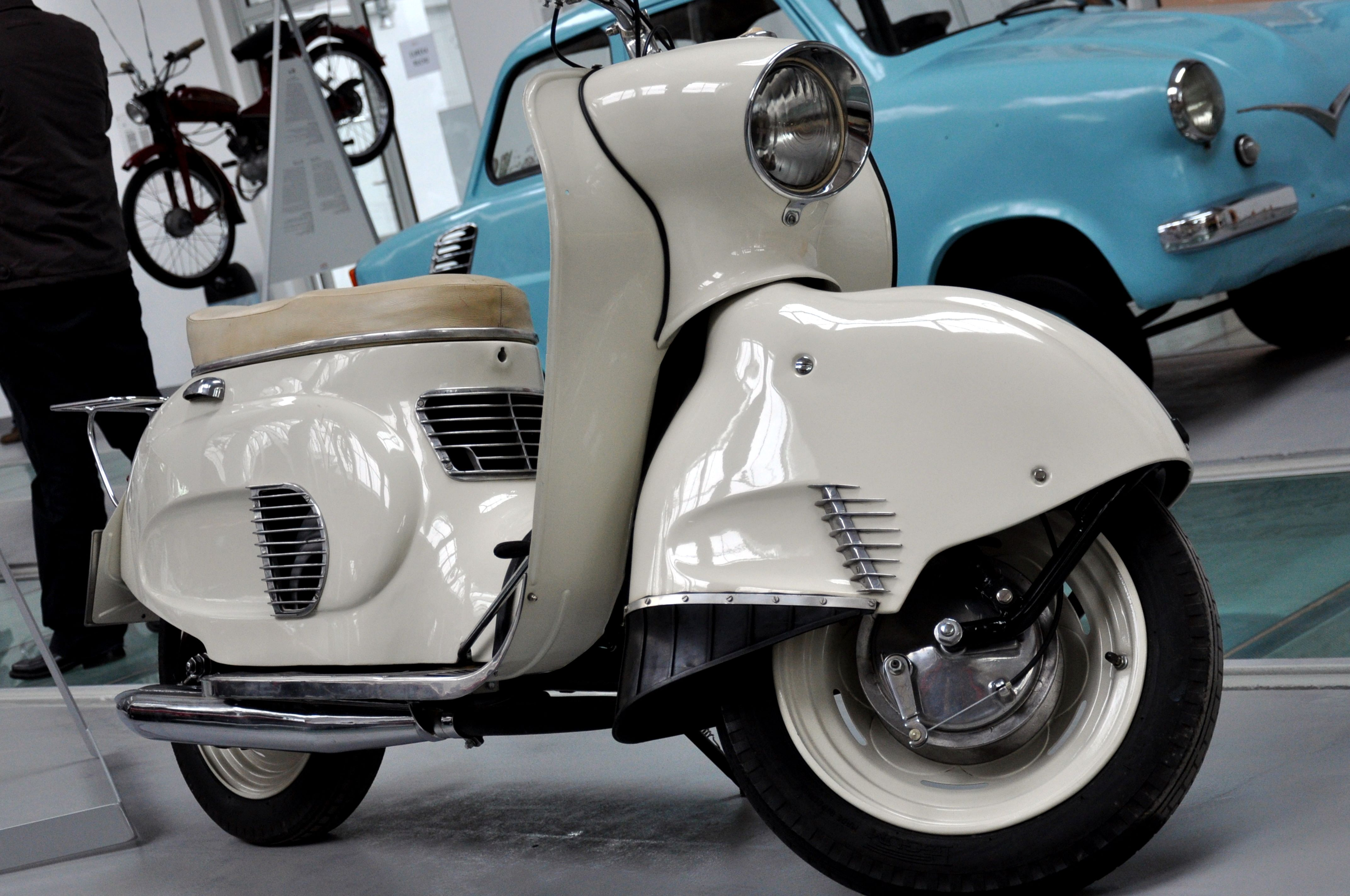 Muzeum Techniki i Komunikacji - Zajezdnia Sztuki w Szczecinie